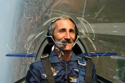 Besenyei Péter vezetés közben.